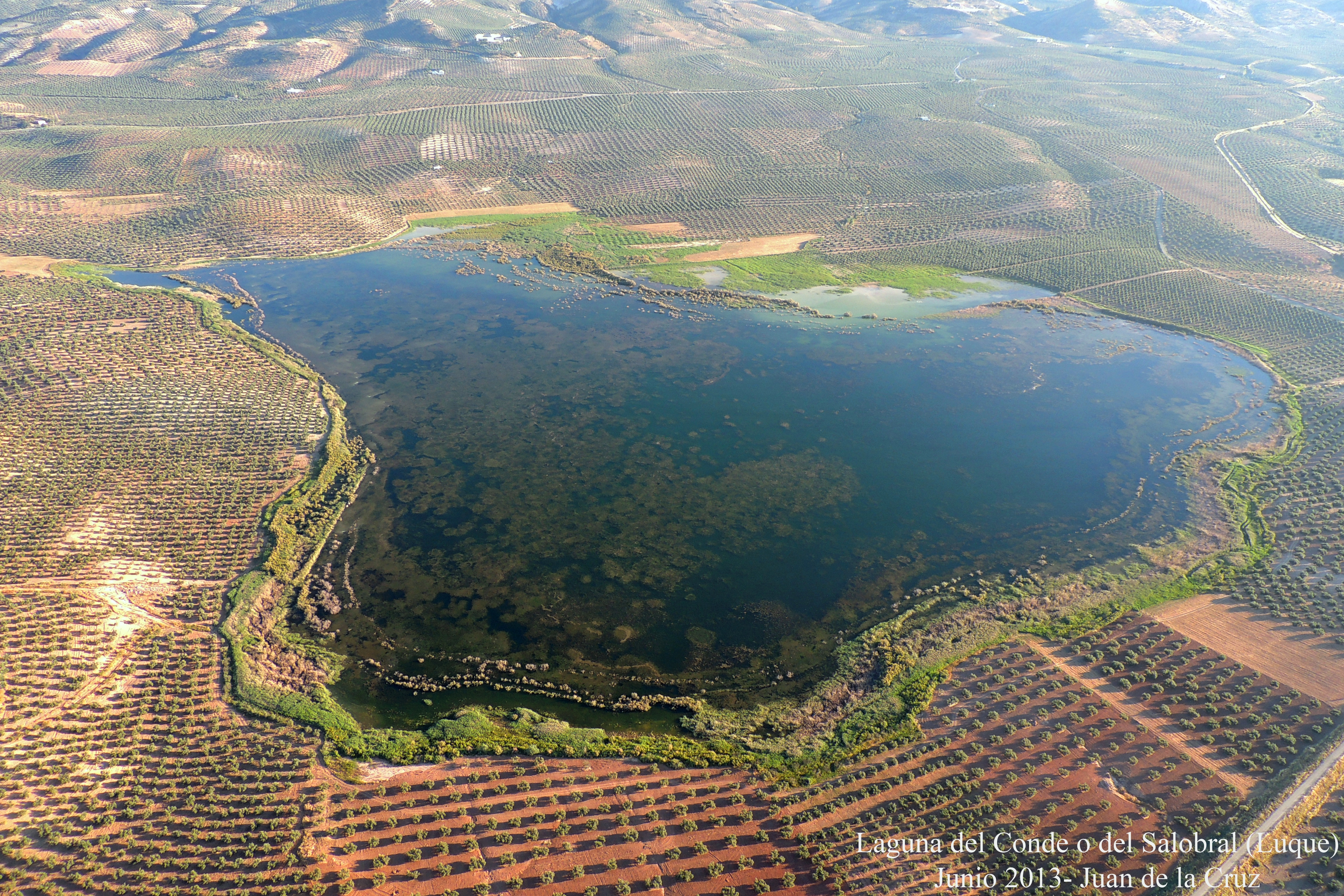 Fotografía aérea de la laguna del Conde o Del Salobral